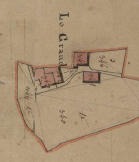 El Grau, de Serrallonga, en el Cadastre napoleònic del 1812 (Arxius Departamentals dels Pirineus Orientals)